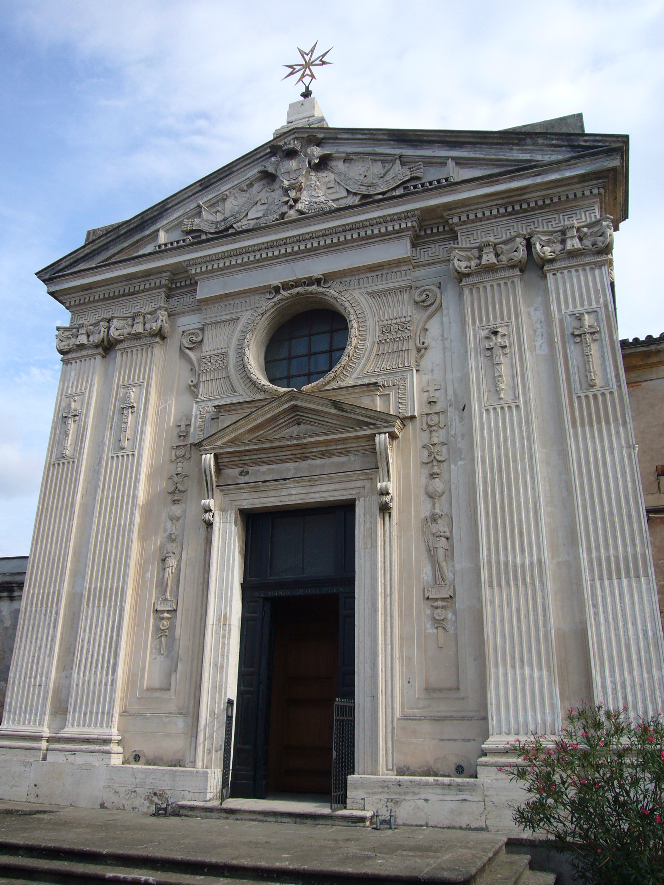 Roma, Villa del Priorato dei Cavalieri di Malta: Santa Maria del Priorato, facciata